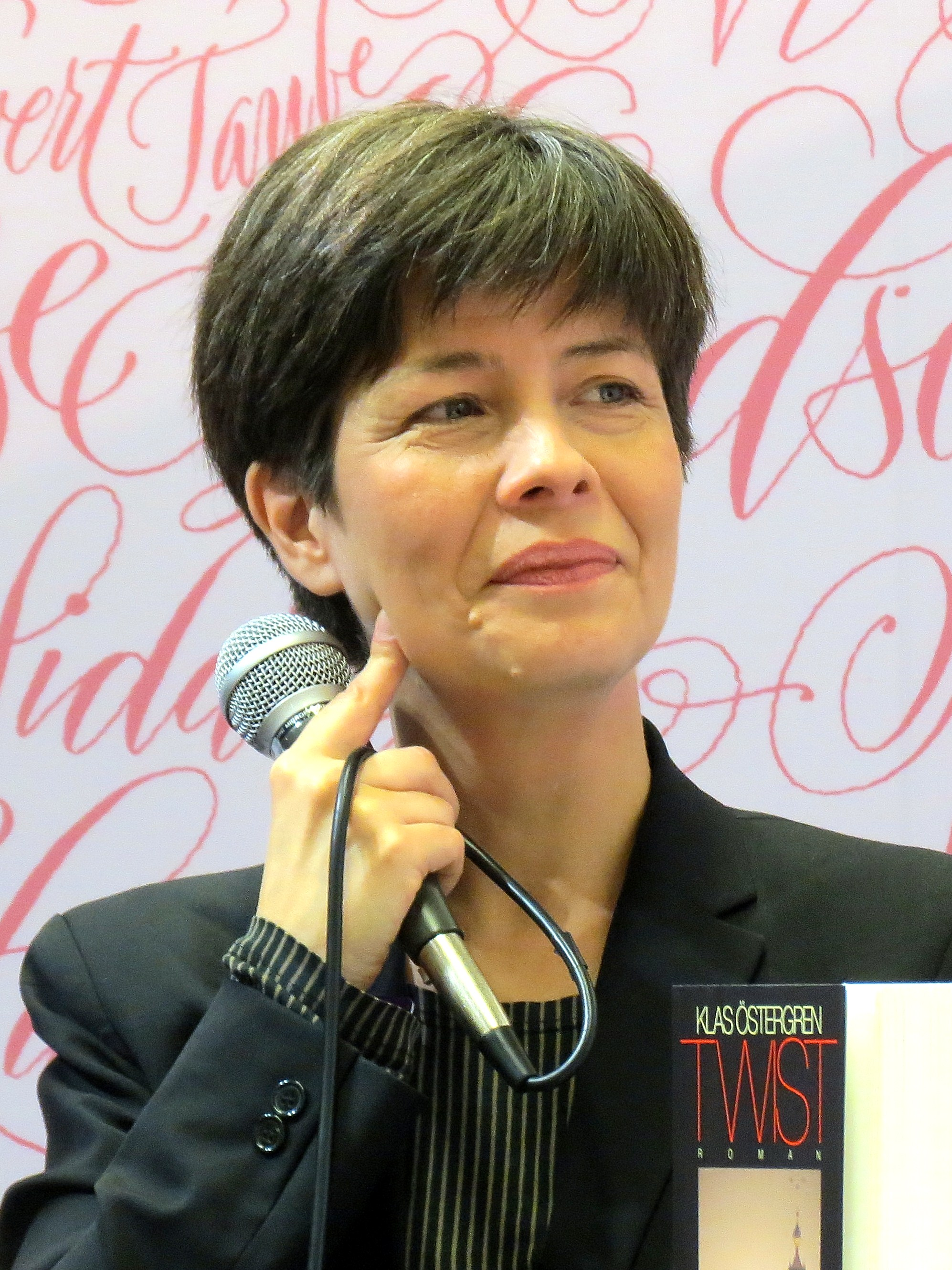 Yukiko Duke, översättare, journalist, redaktör och programledare.